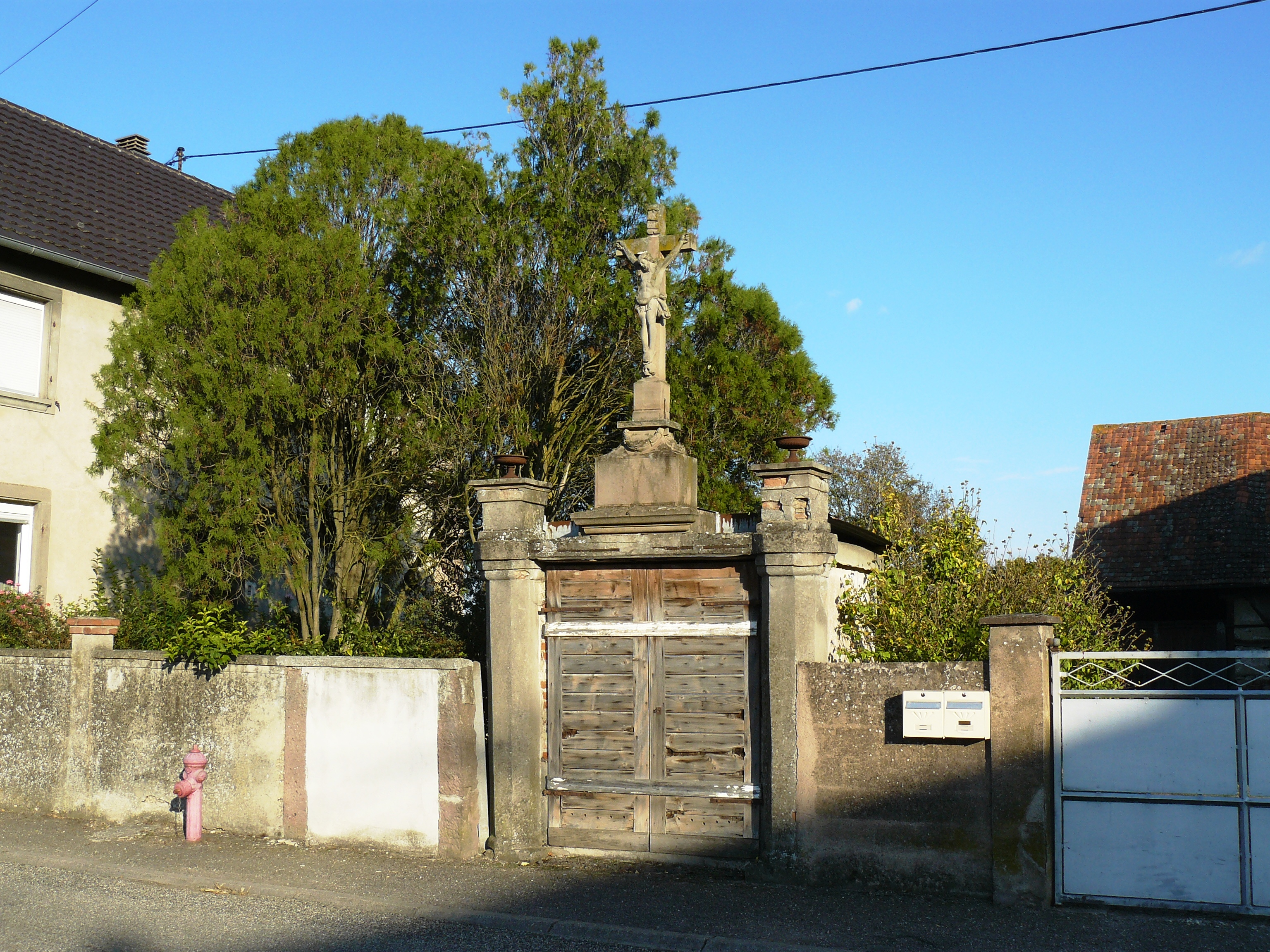 Saasenheim, Croix de chemin de 1828